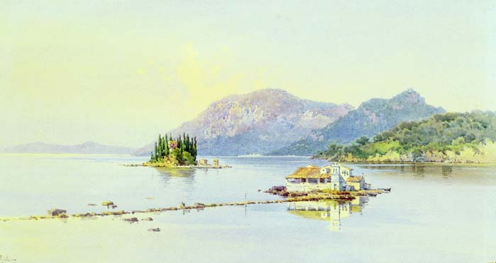 Ποντικονήσι, Κέρκυρα υδατογραφία σε χαρτί 40x72 εκ.